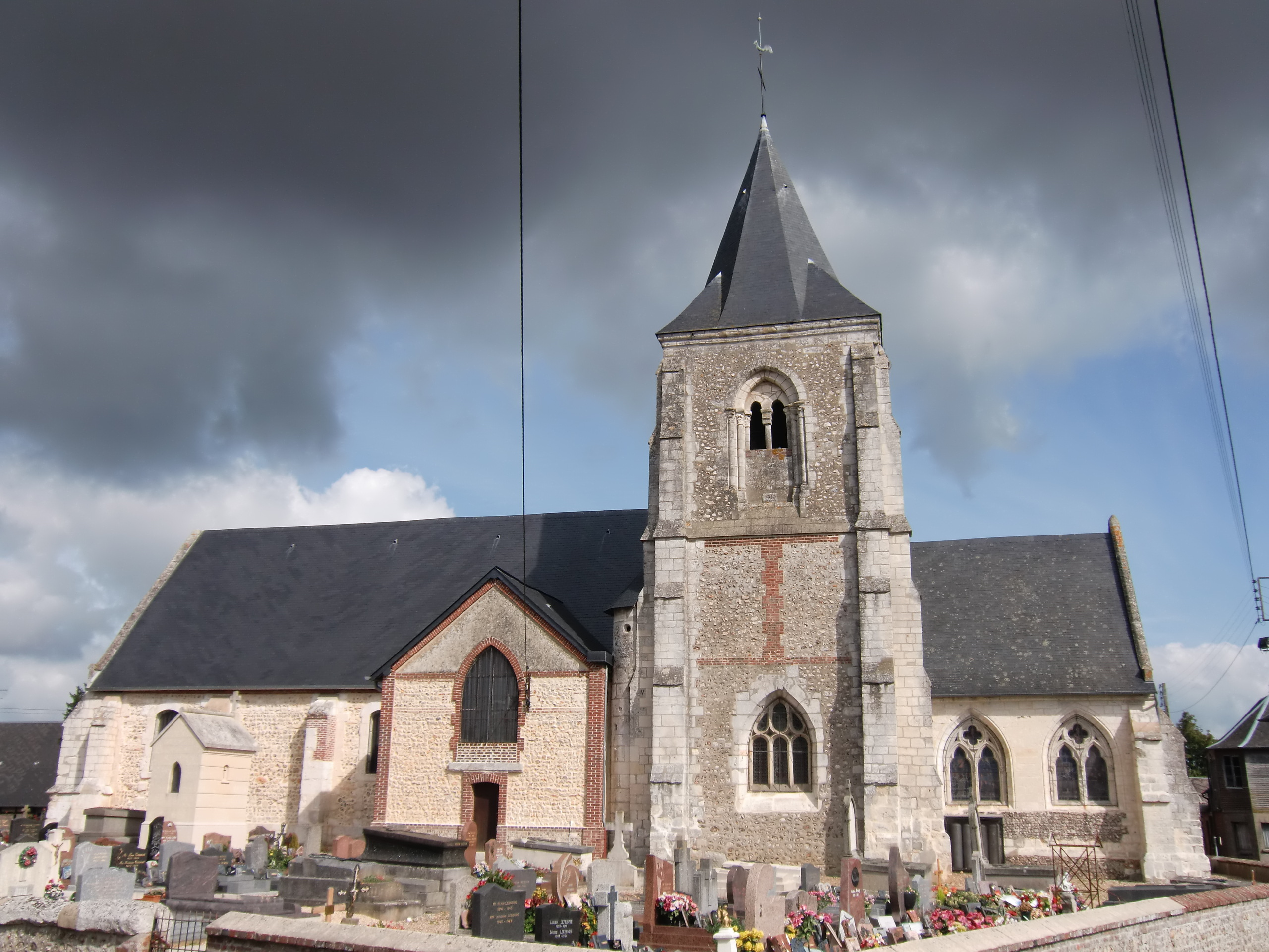 église d'Etréville (Eure, Normandie, France)